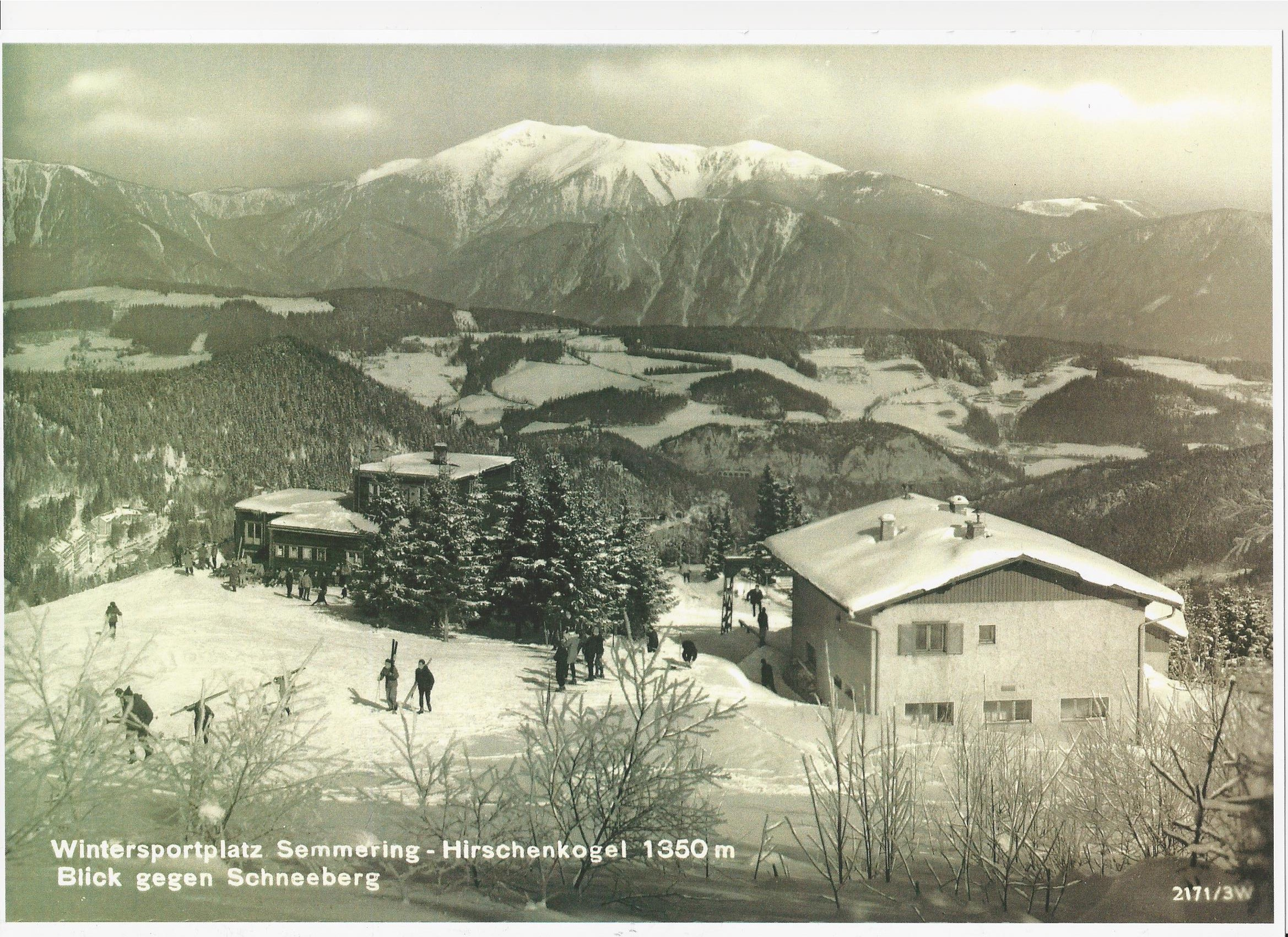 Bergstation und Liechtsteinhaus am Hirschenkogel, 1934